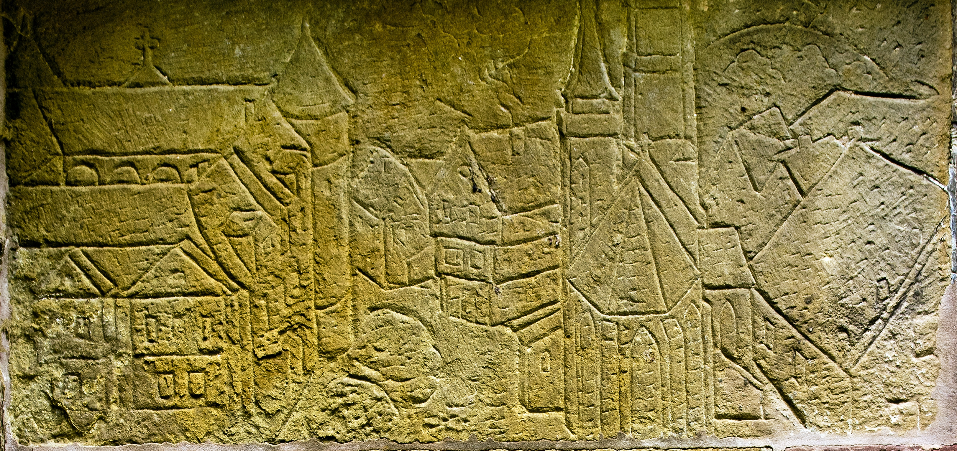 Reformationsdenkmal an der Südfassade der Hospitalkirche in Stuttgart, Wandrelief Nr. 1 (Nummerierung siehe file:Hospitalkirche, 002.jpg): Altes Schloss und Stiftskirche in Stuttgart.